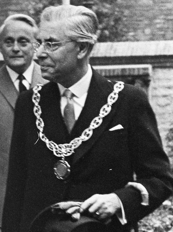 Collectie / Archief : Fotocollectie Anefo Reportage / Serie : Koningin Juliana bezoekt Gouda en Rotterdam Beschrijving : koningin Juliana krijgt bloemen aangeboden. Naast haar burgemeester van Gouda K.F.O. James Datum : 18 juni 1964 Locatie : Gouda, Zuid-Holland Persoonsnaam : James, K.F.O., Juliana (koningin Nederland) Fotograaf : Fotograaf Onbekend / Anefo Auteursrechthebbende : Nationaal Archief Materiaalsoort : Negatief (zwart/wit) Nummer archiefinventaris : bekijk toegang 2.24.01.05 Bestanddeelnummer : 916-5539